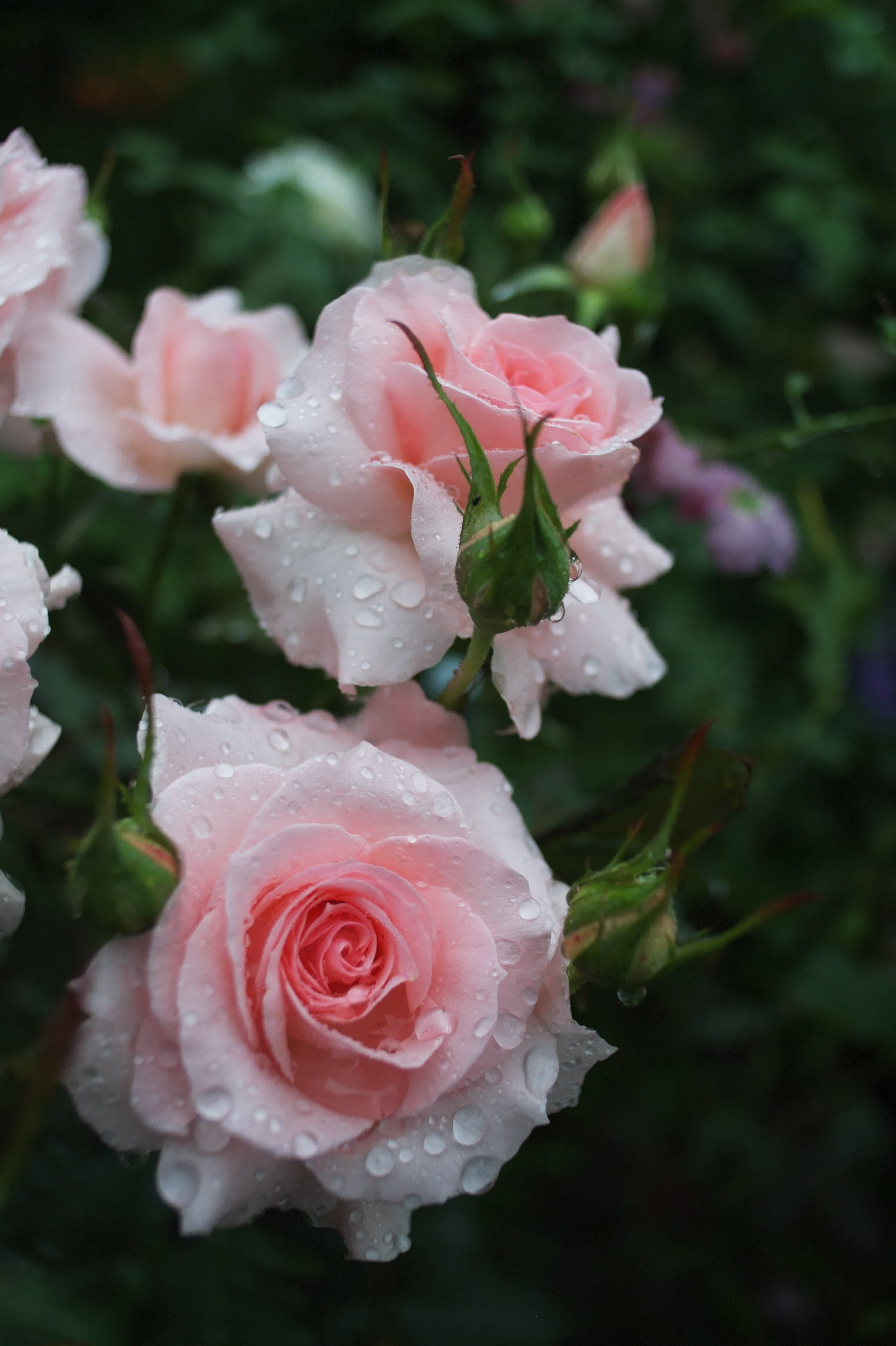 Carl Zeiss Jena - MC Flektogon 20mm f/2.8 (at f/2.8)